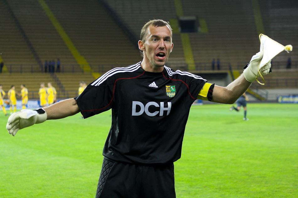 Александр Горяинов